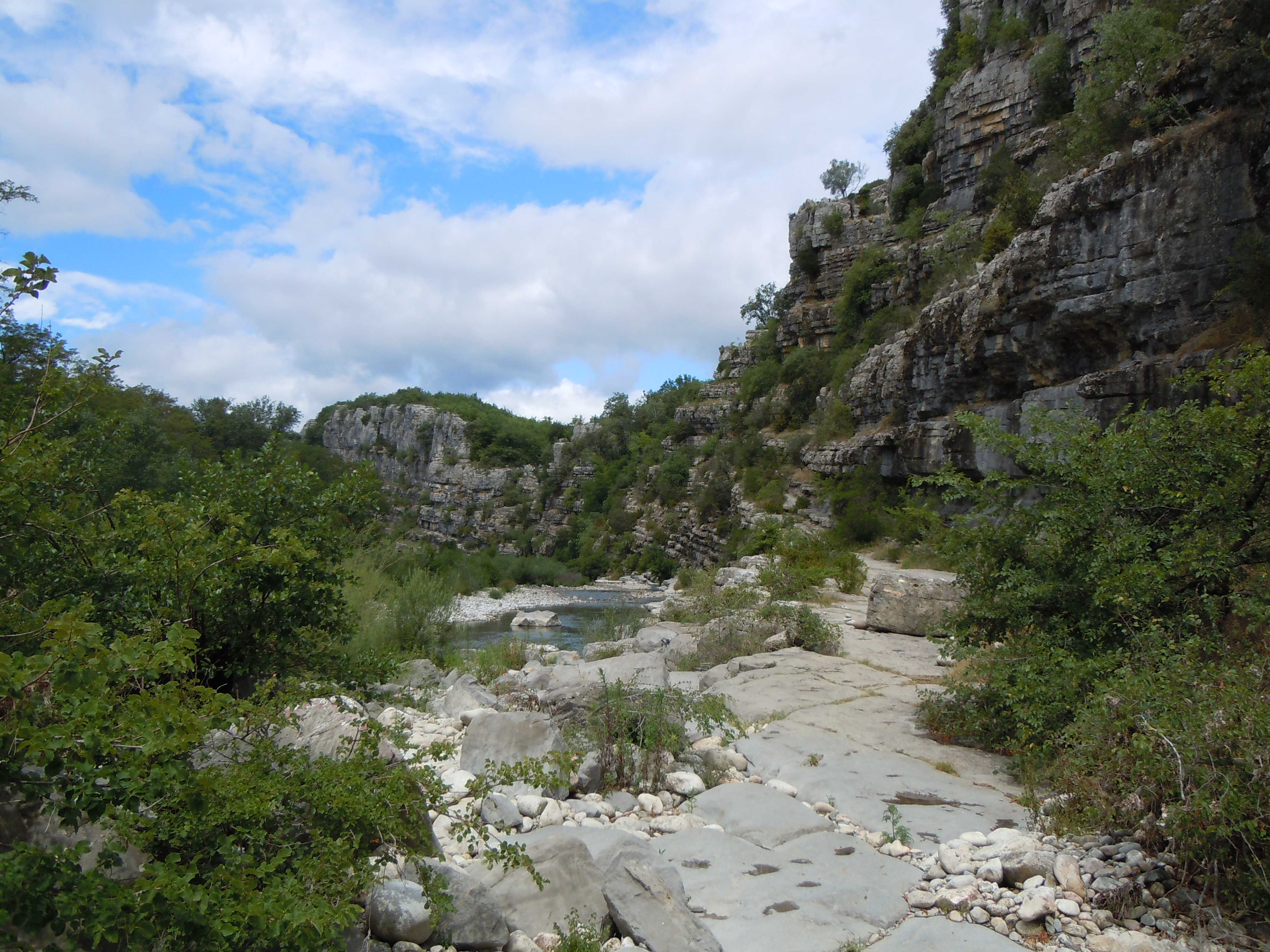 Gorges de la Beaume (chemin d'acces au Belvédère) - Labeaume - Ardèche